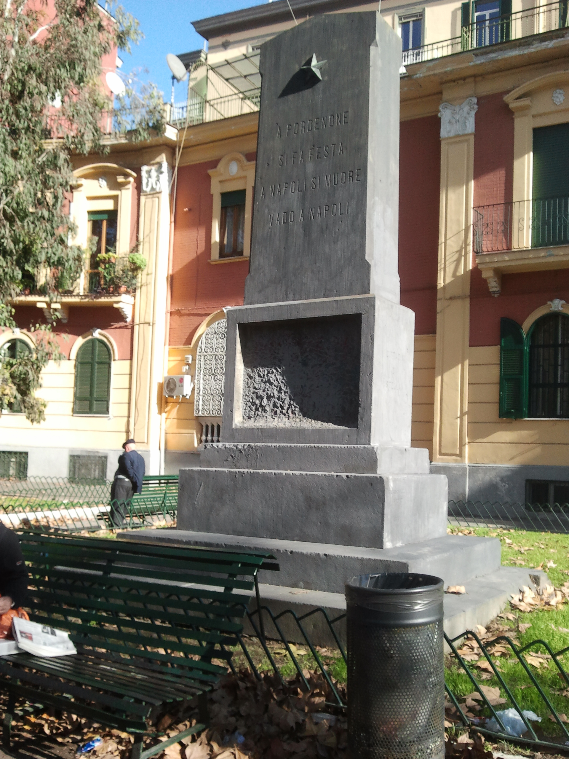 Stele in ricordo di Umberto I che soccorre la città colpita dal colera del 1884. Epigrafe: A Pordenone si fa festa a Napoli si muore vado a Napoli